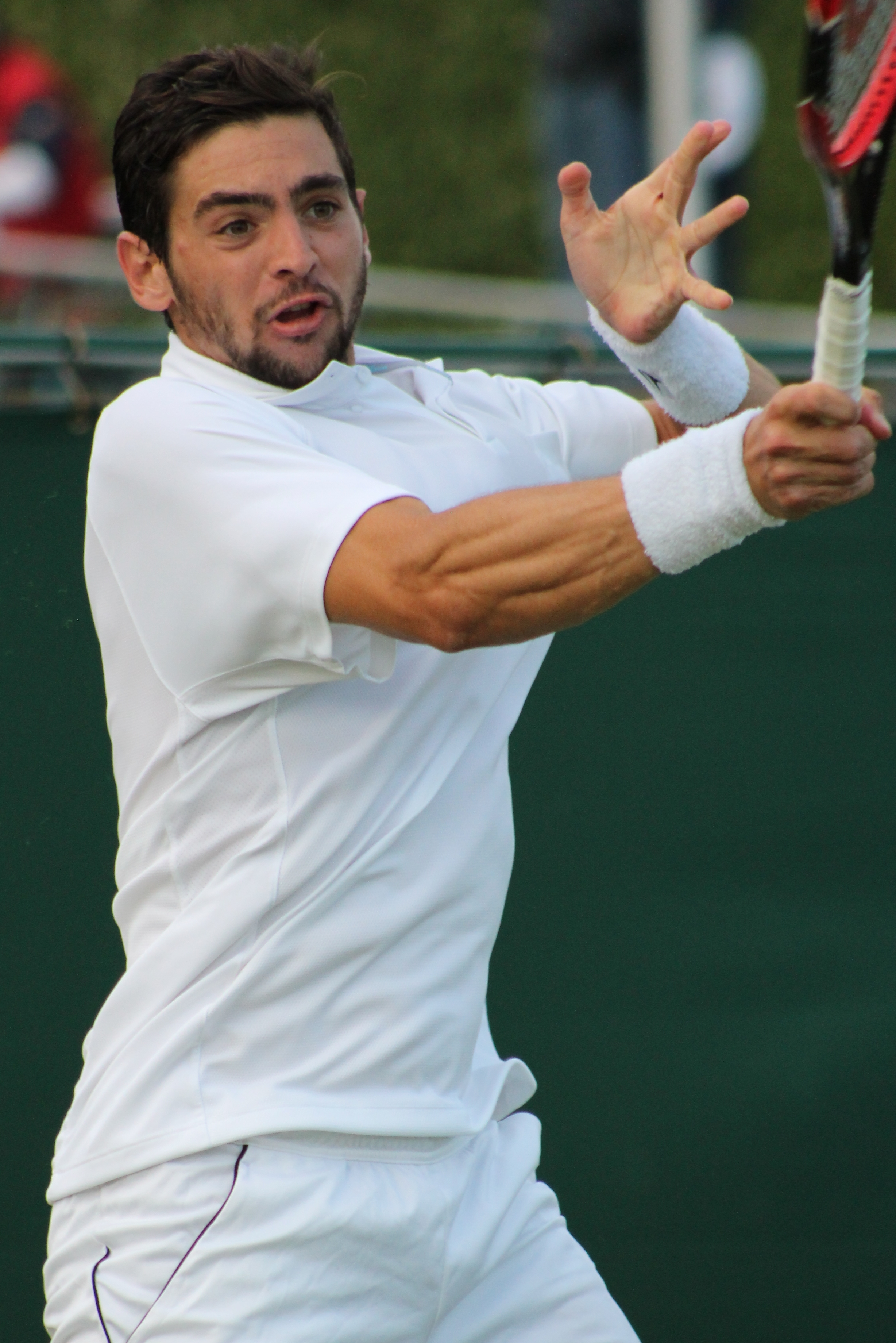 Andreozzi WMQ15 (9)